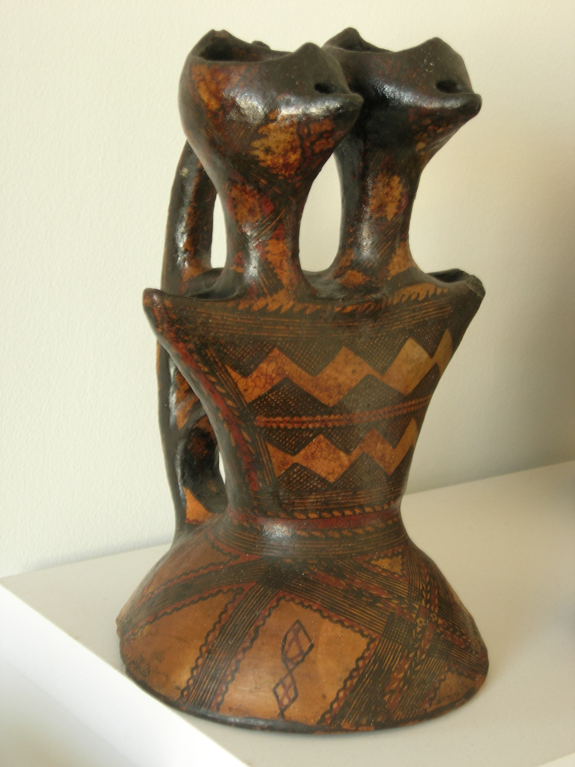 Poterie kabyle, début du XXème siècle (?)